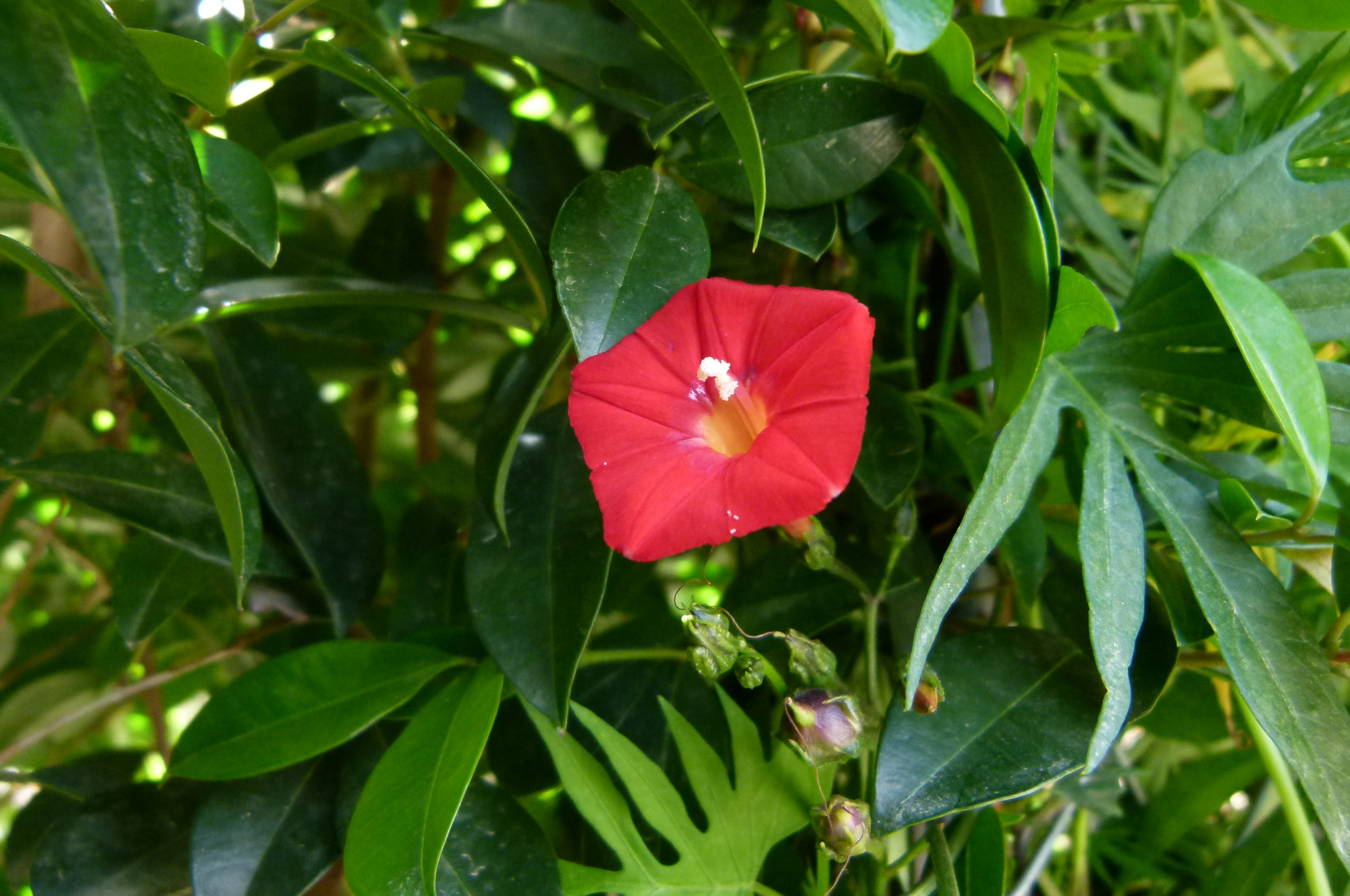 Ipomea quamoclit "Cardinalis"